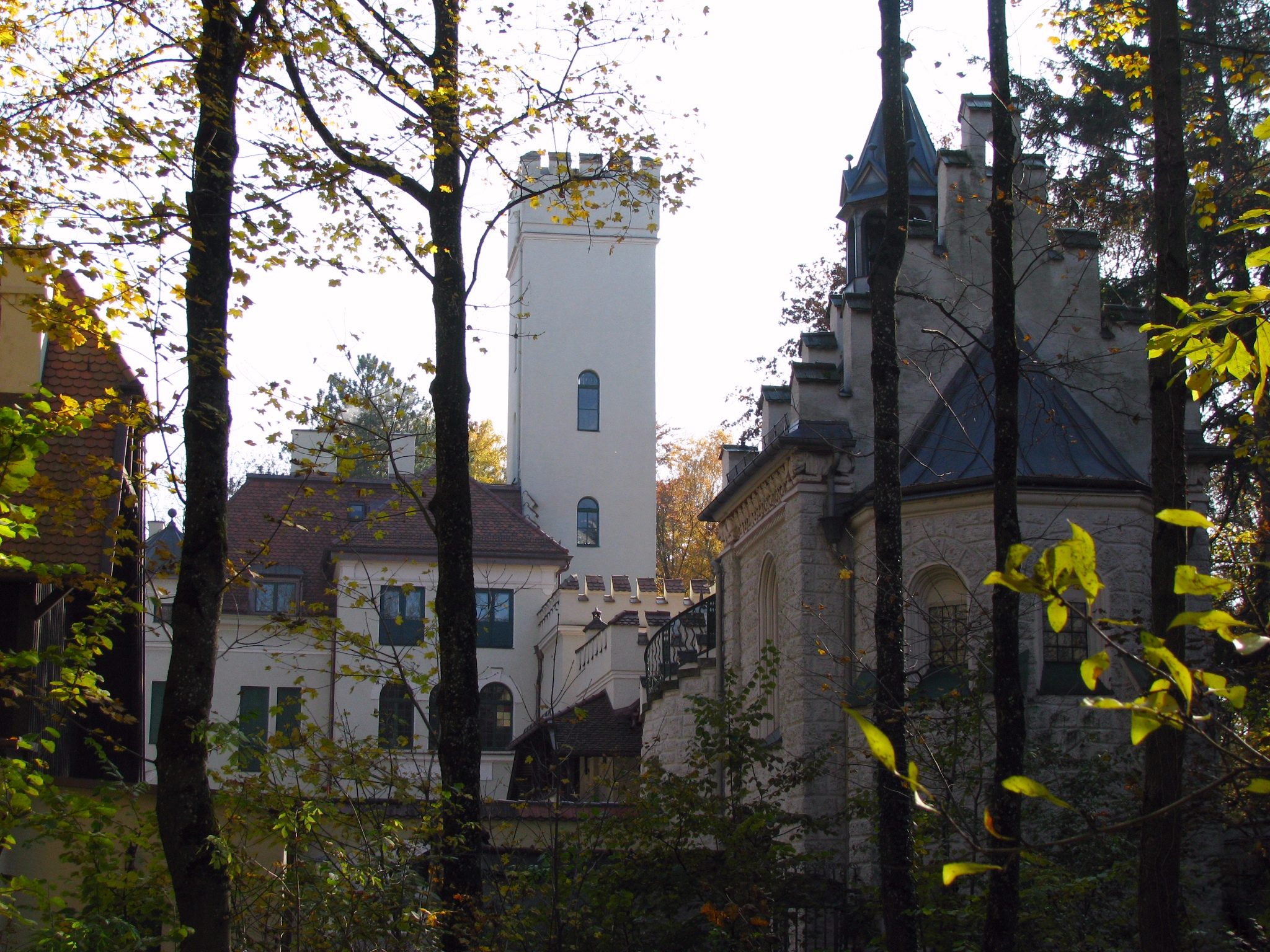 Gilmer Schloss im Münchner Stadtteil Allach an der Stadtgrenze zu Karlsfeld